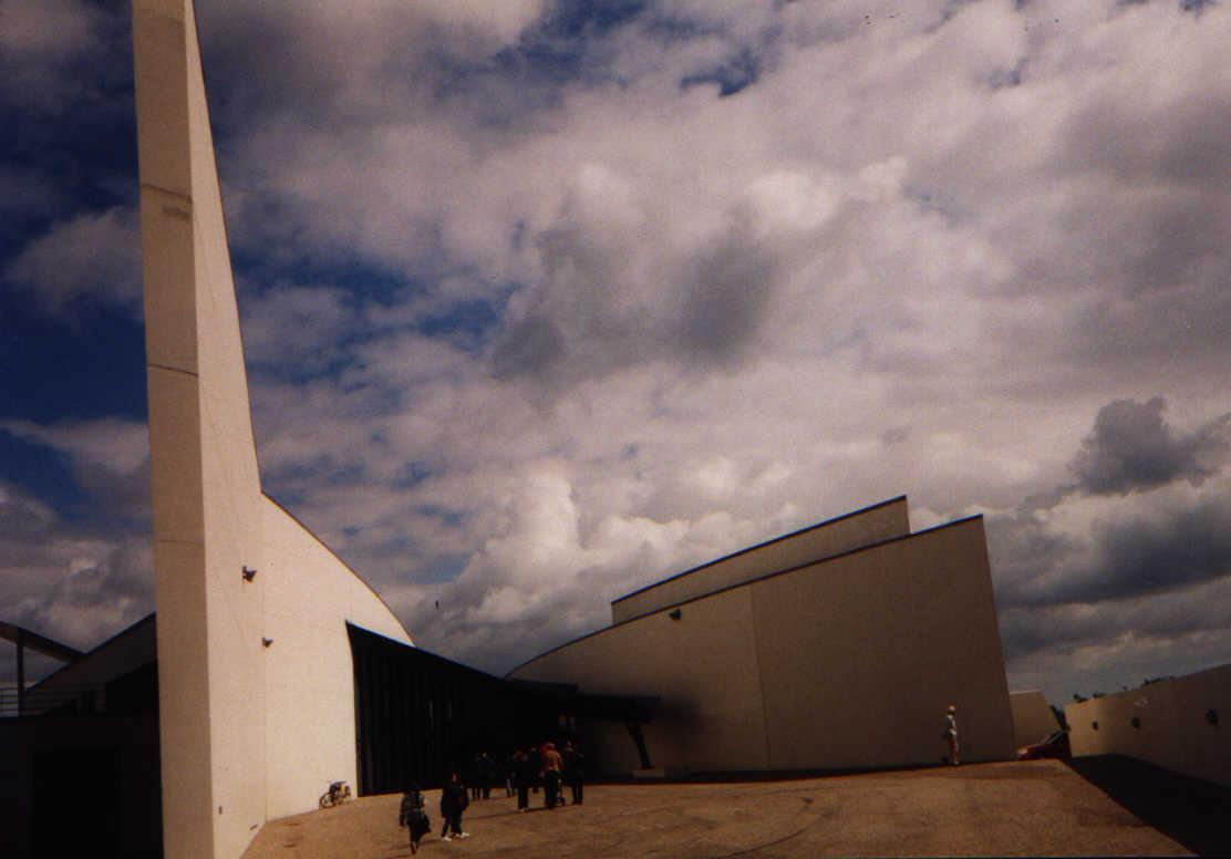 Arken - Museo per l'arte moderna, Copenhagen (DK)